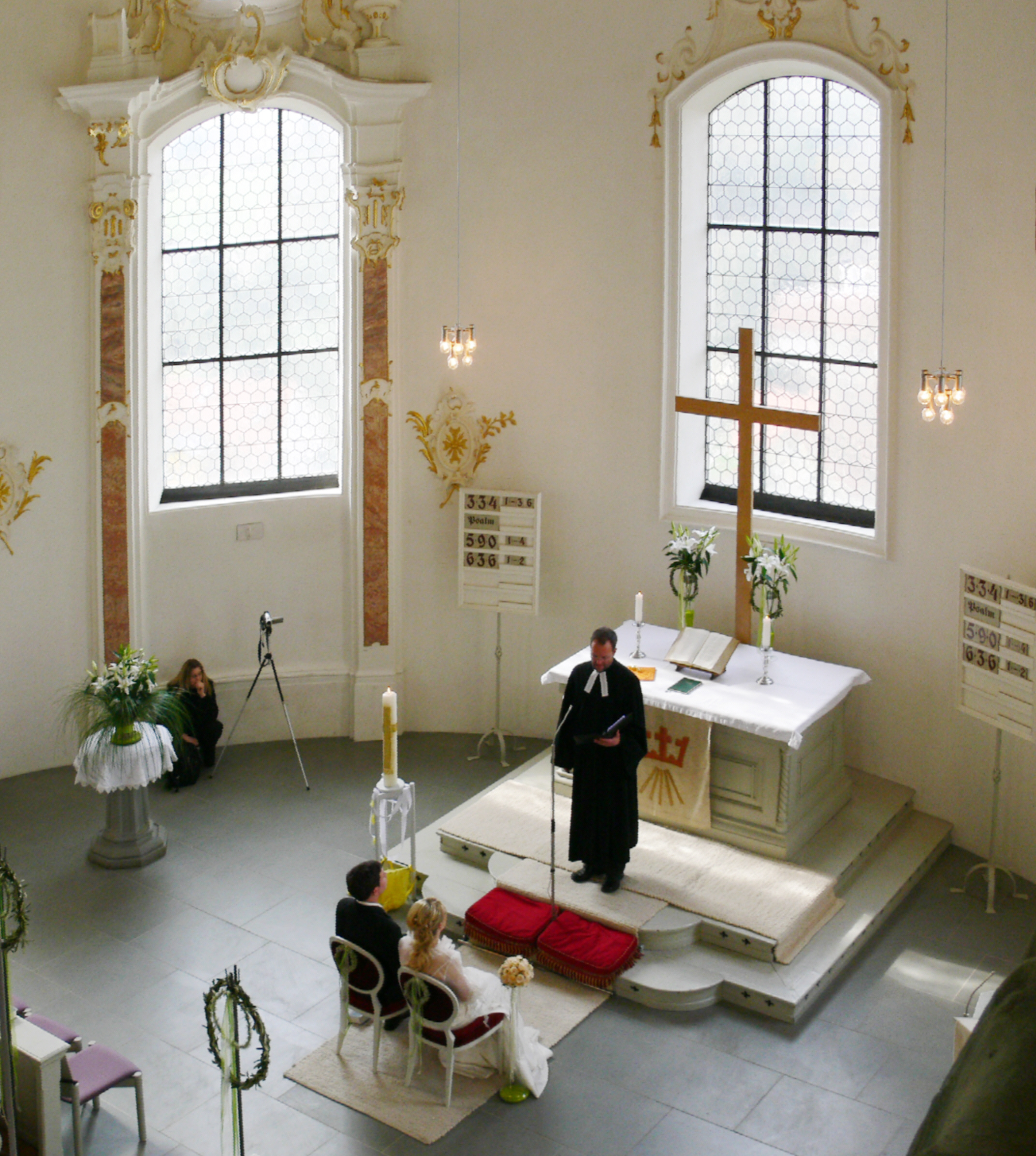 Schlosskirche (ehem. Schlosskapelle), Neues Schloss,Tettnang Blick von der Empore auf die Apsis